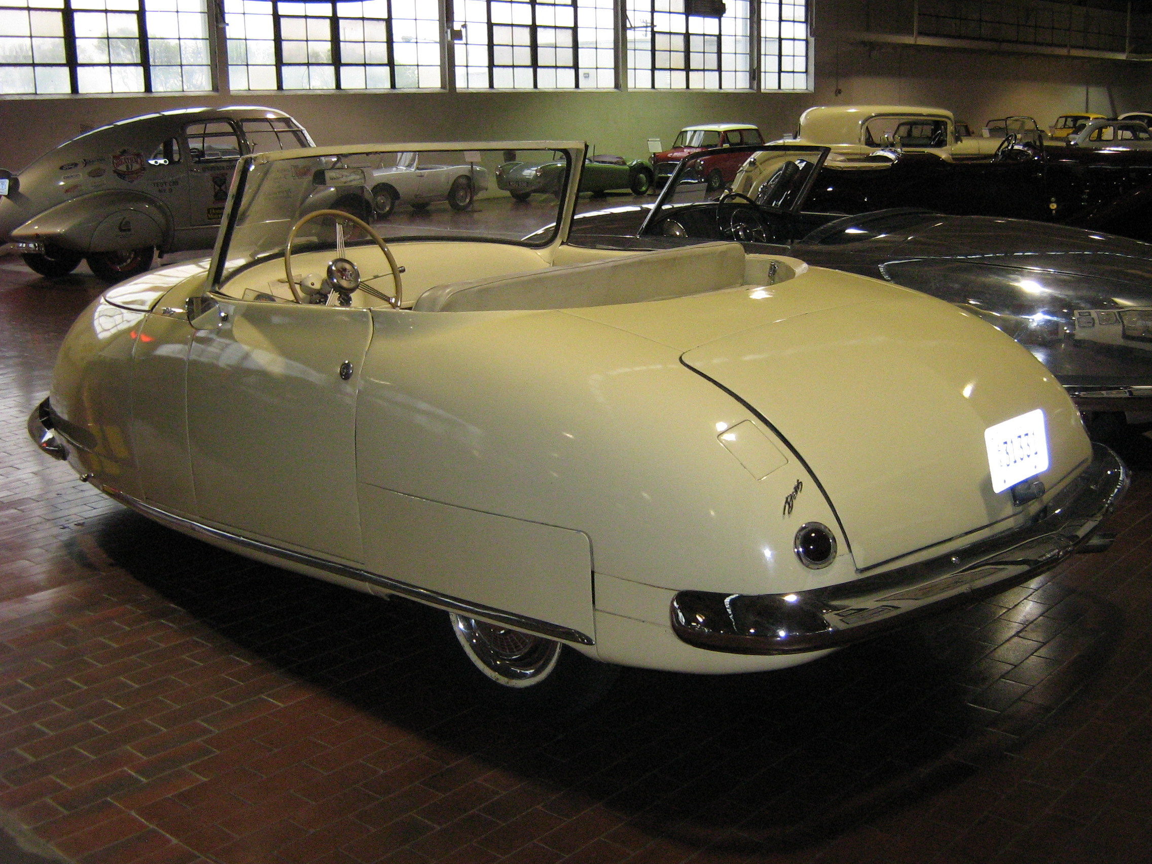 1948 Davis